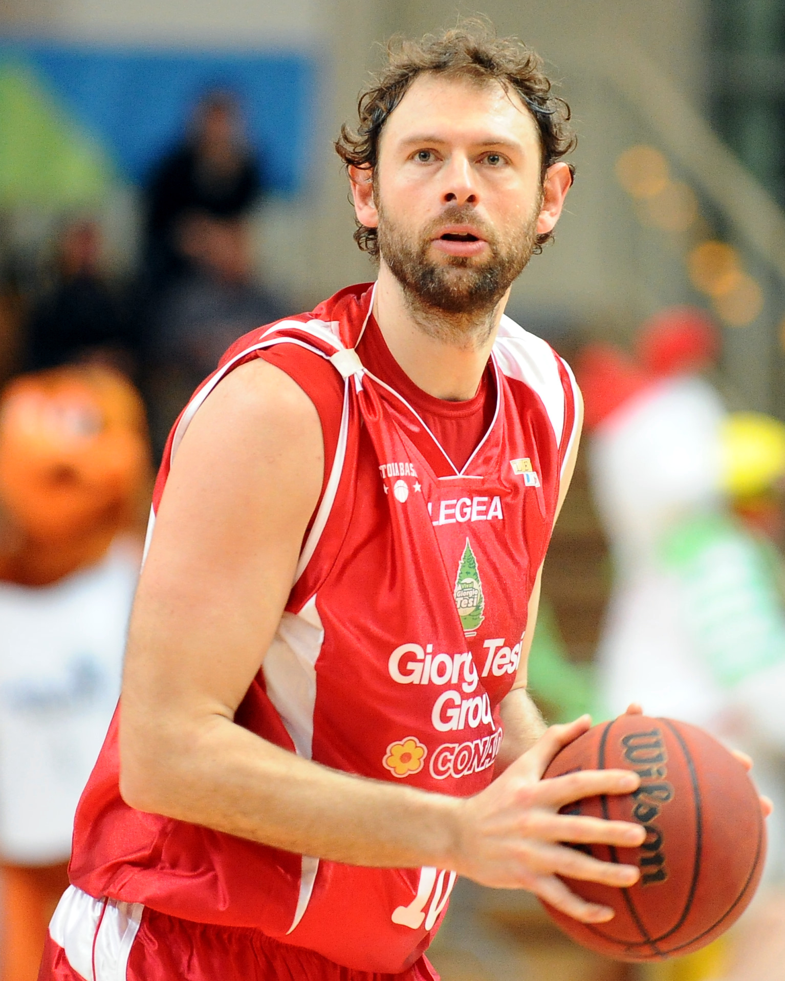 Giacomo Galanda con la maglia del Pistoia Basket 2000 al PalaTrento.